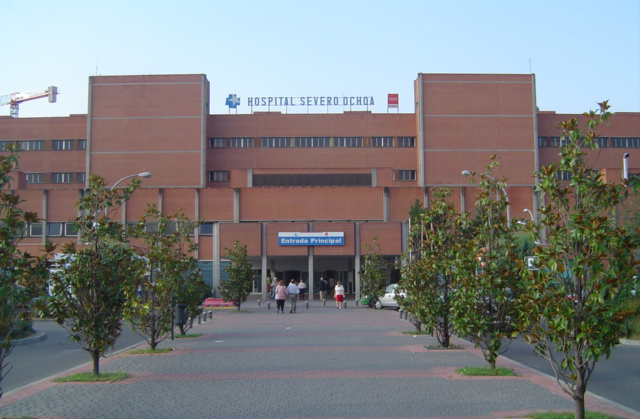 Puerta central del Hospital Severo Ochoa